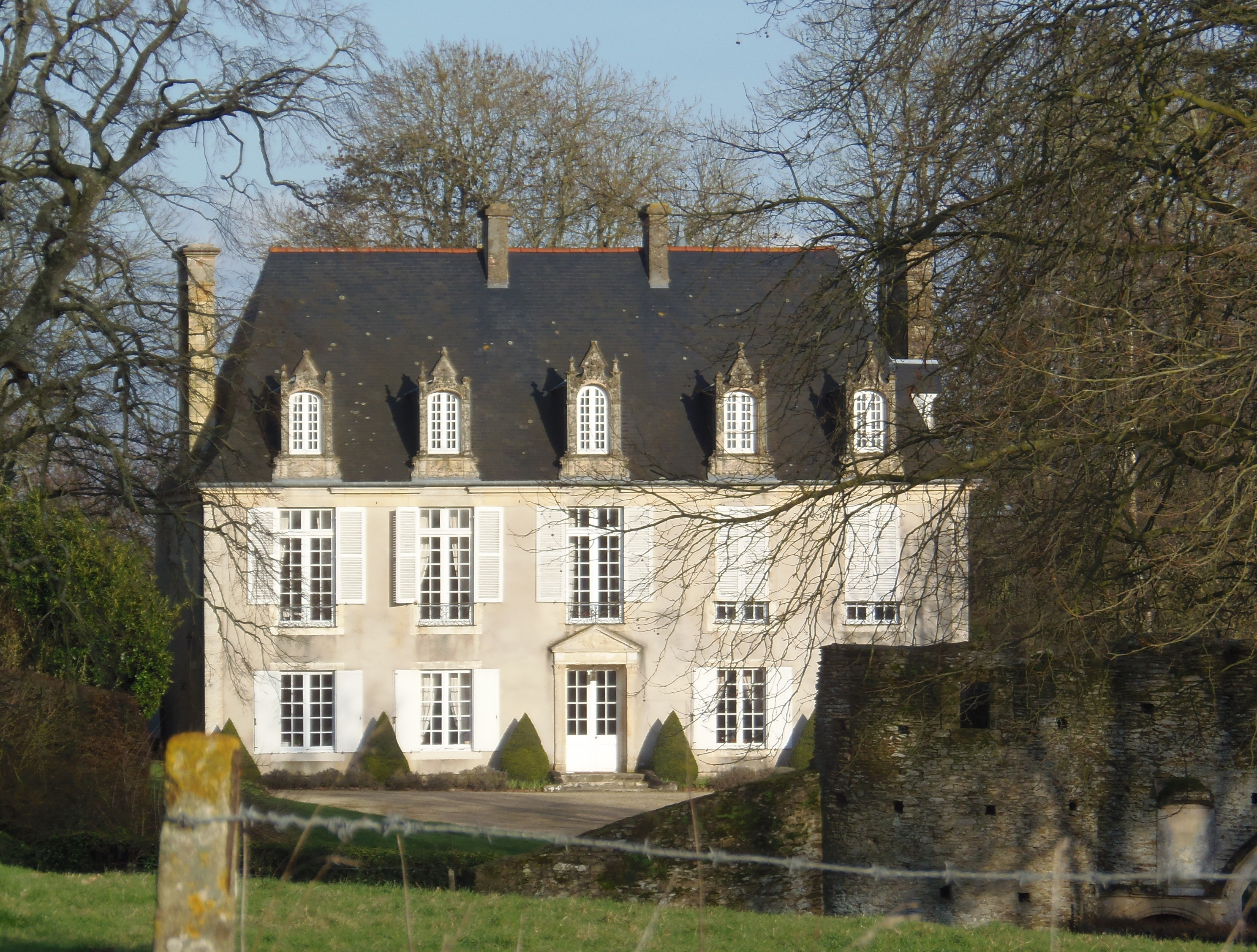 Tournay-sur-Odon (Normandie, France). Le château de Ragny.